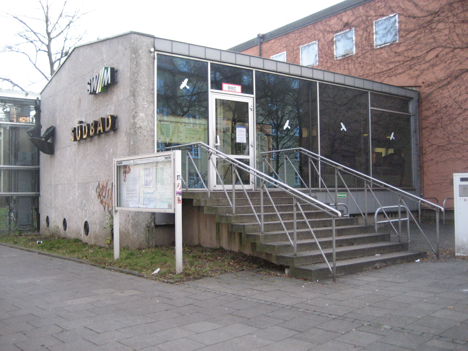 Frontansicht des Südbads